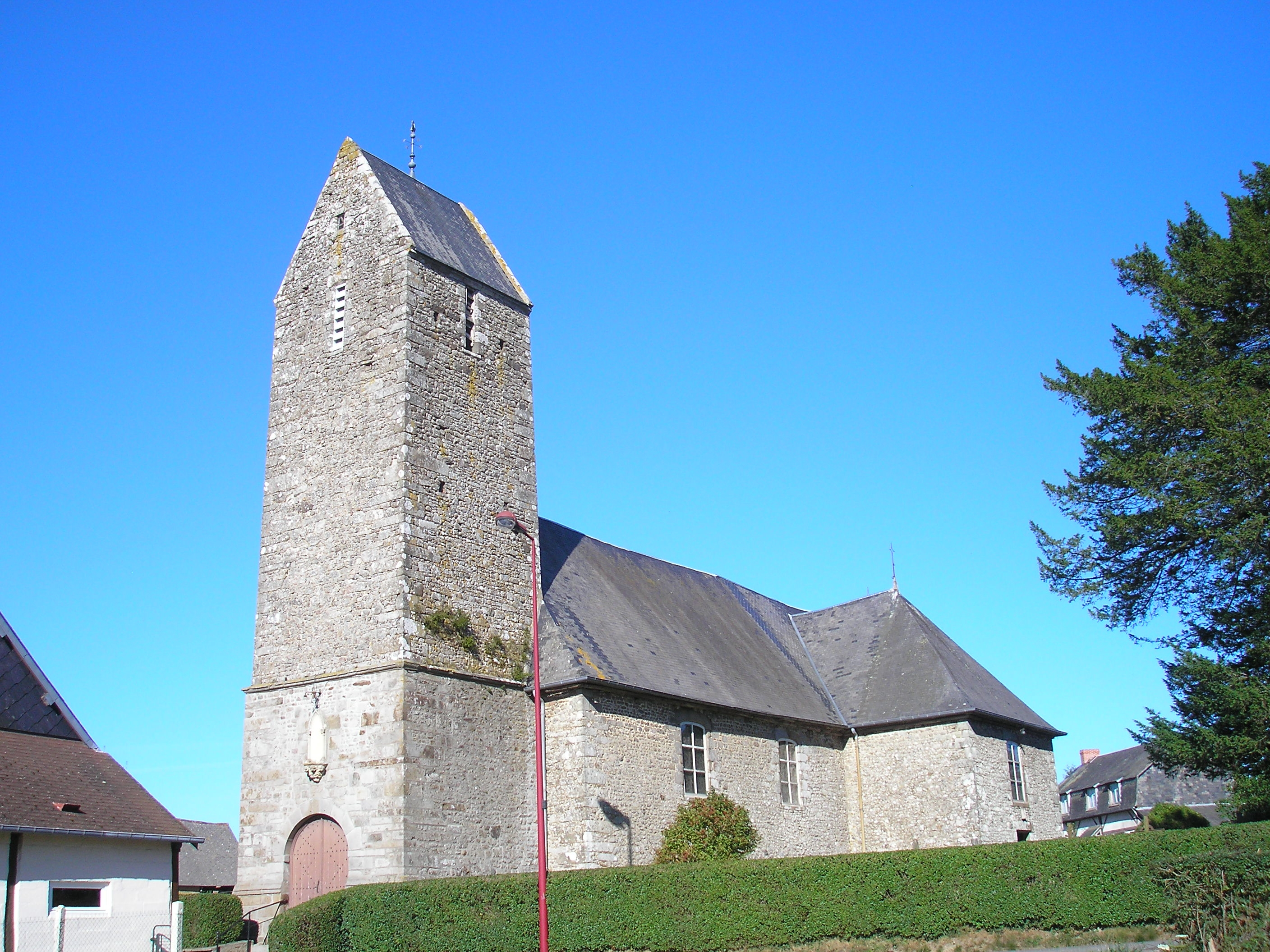 Saires-la-Verrerie (Normandie, France). L'église Saint-Patrice.